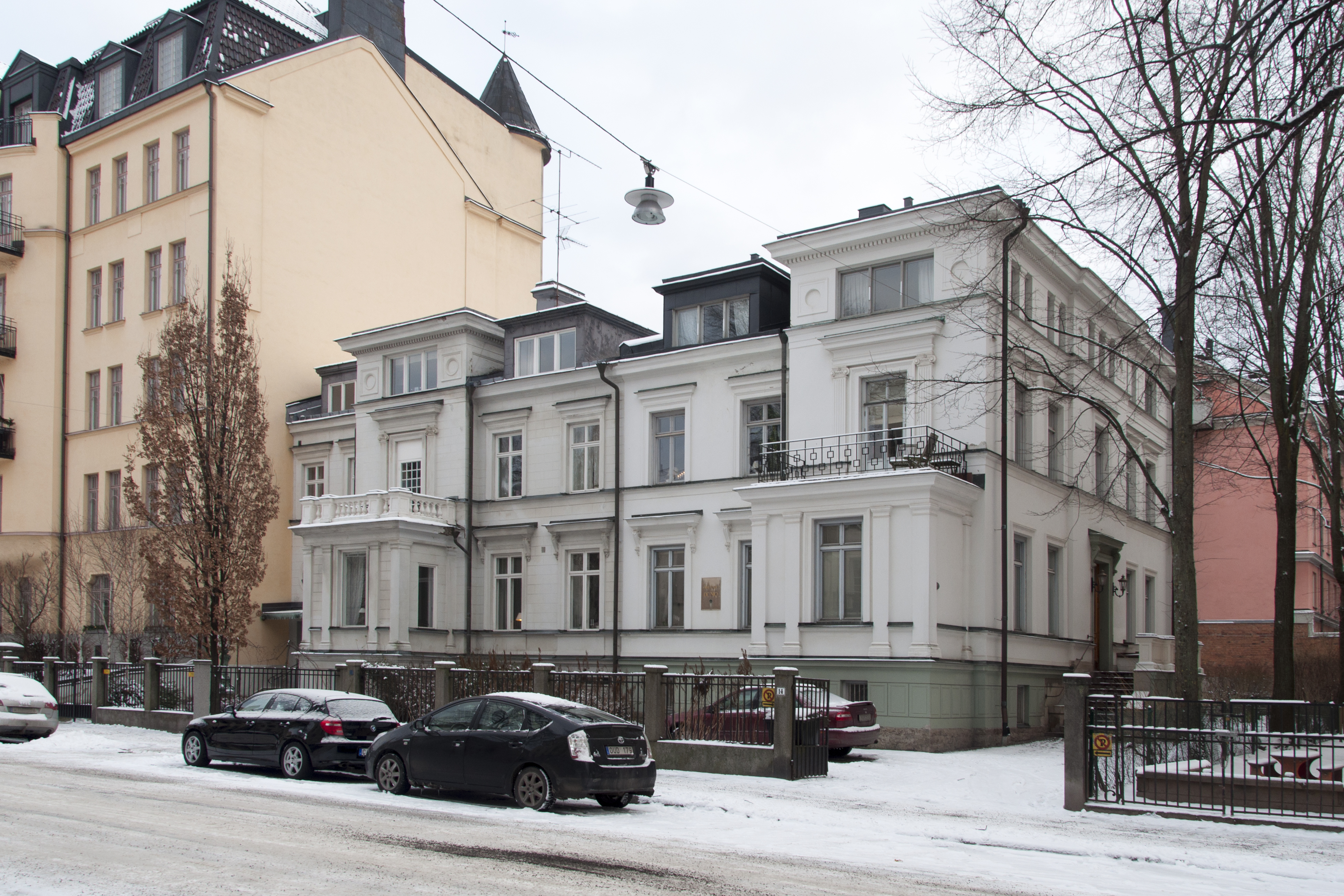 Granen 12, Villagatan 14. Byggnadsår 1876, arkitekter Axel & Hjalmar Kumlien, bygg- herre G A Beer, byggmästare J Möller. Villan donerades på 1910-talet av författarinnanLotten von Kraemer till Samfundet De Nio